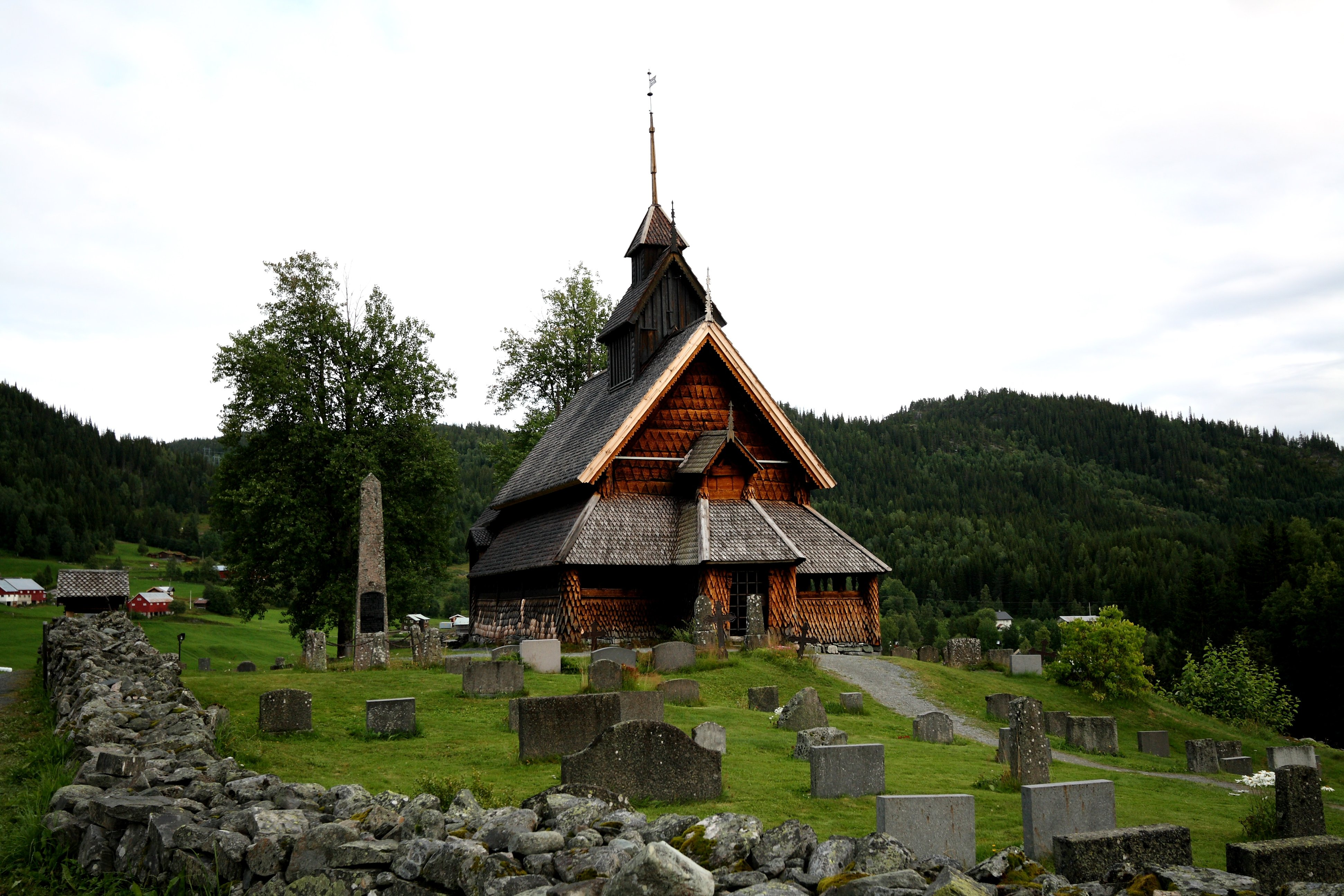 no: Eidsborg stavkyrkje en: Eidsborg stave church nahe Dalen.